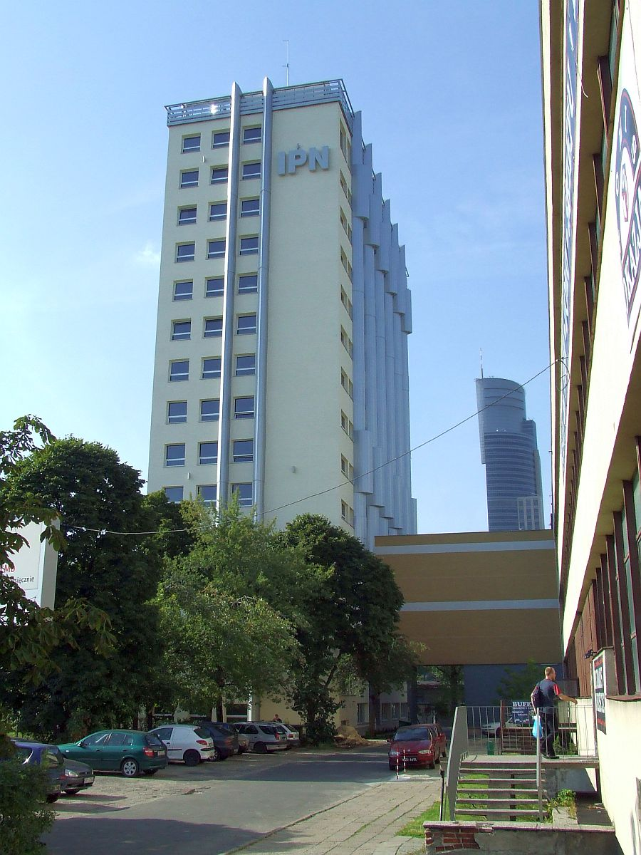 Warsaw, Instytut Pamięci Narodowej - Komisja Ścigania Zbrodni przeciwko Narodowi Polskiemu, Towarowa Street